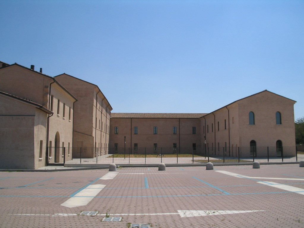 Complesso di San Domenico, Forlì (Italy)